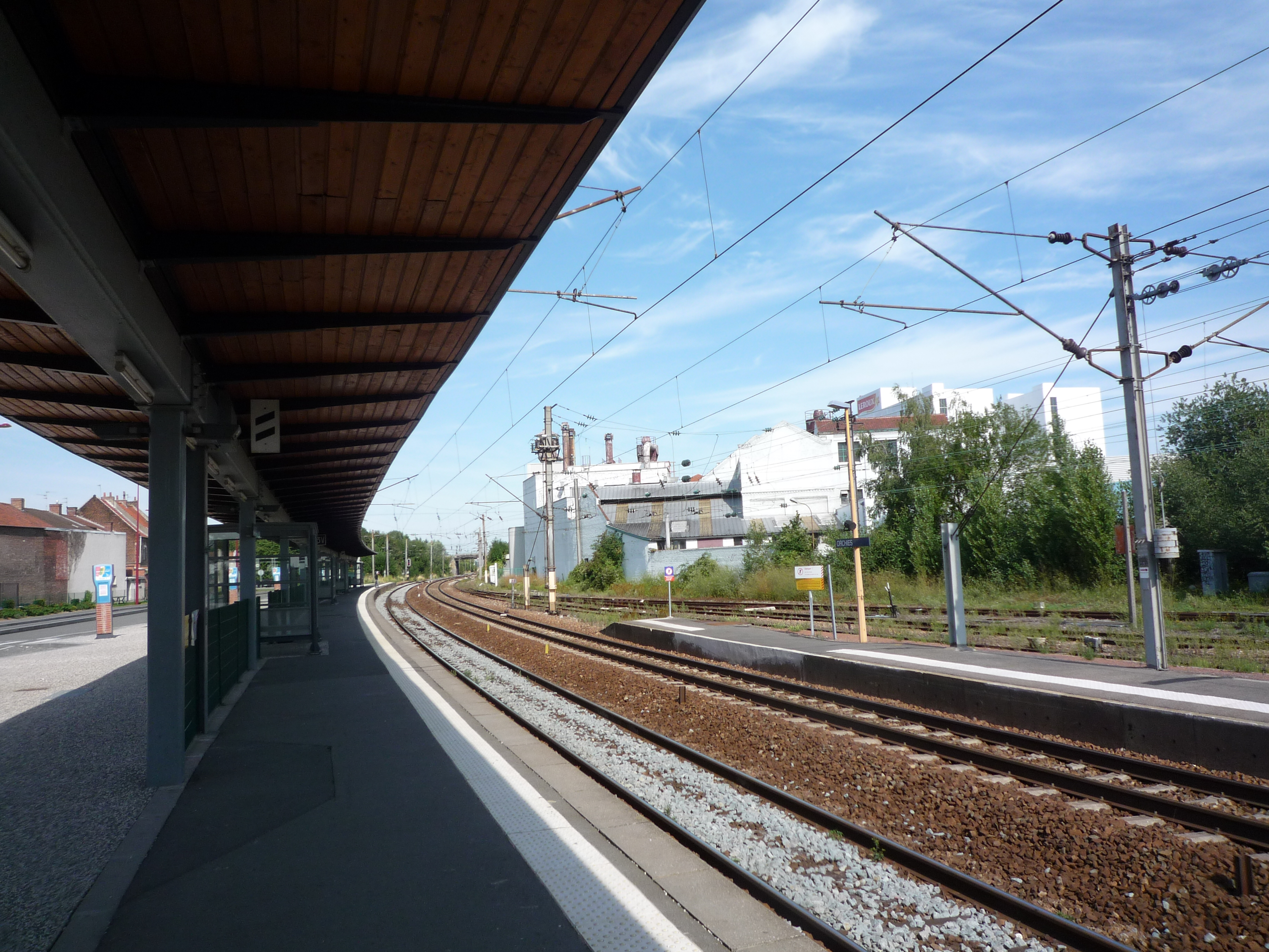 Gare d'Orchies, Nord, Nord-Pas-de-Calais, France.